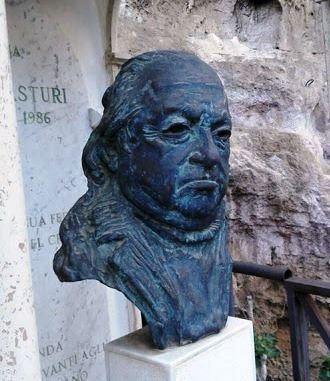 Ritratto Bronzeo di Antonio Asturi presso la sua tomba.